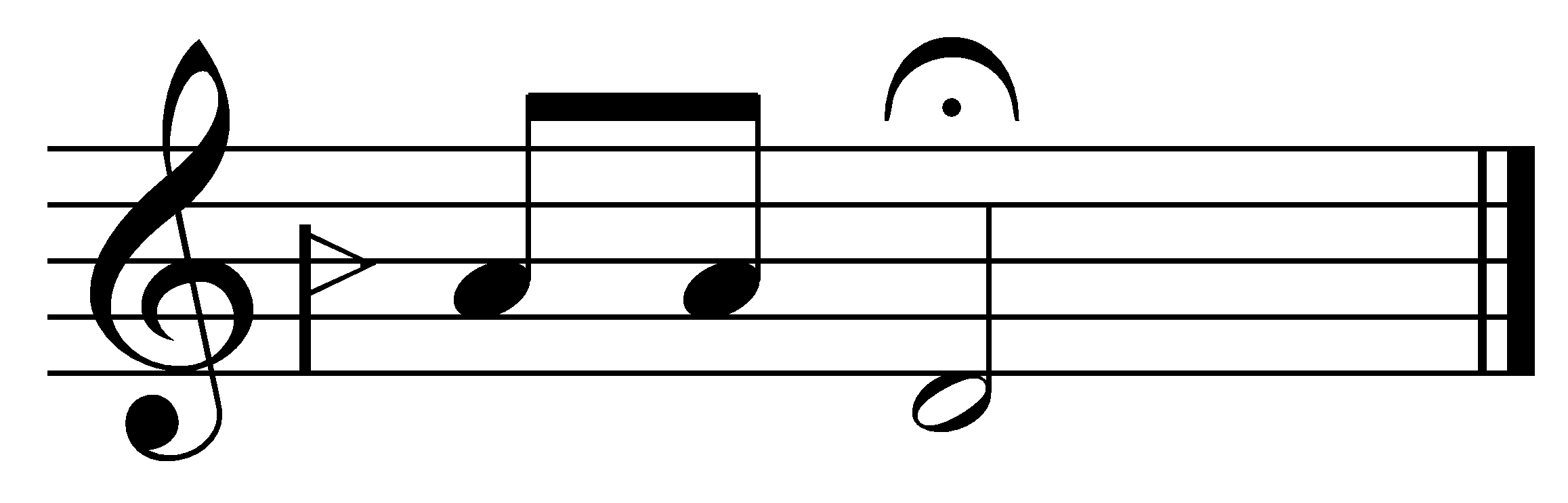 (فرود نوا (بال کبوتر